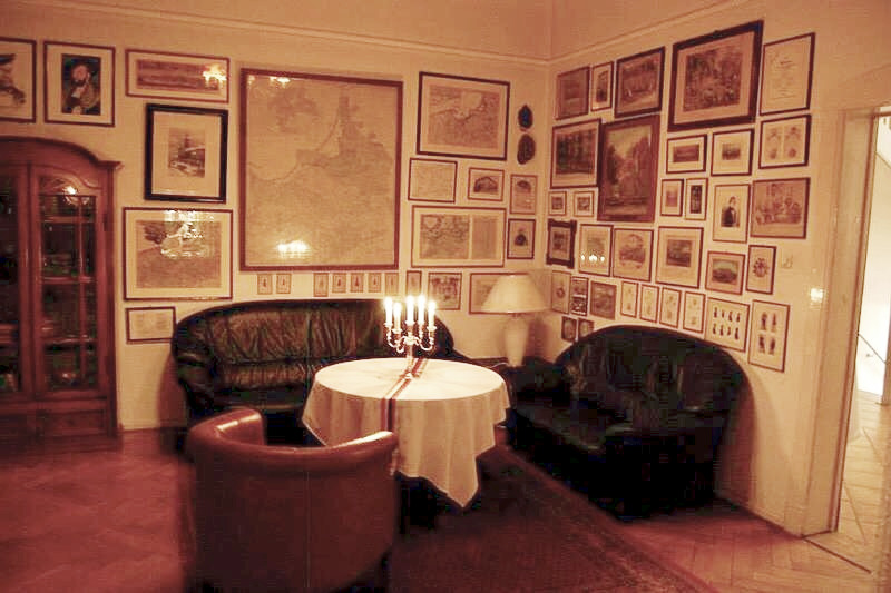 Masurken-Zimmer in der Düppelstraße